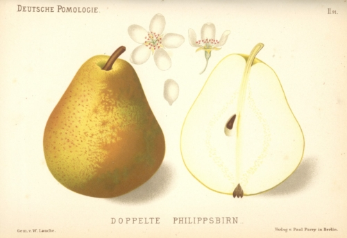 Doppelte Philippsbirne aus Deutsche Pomologie